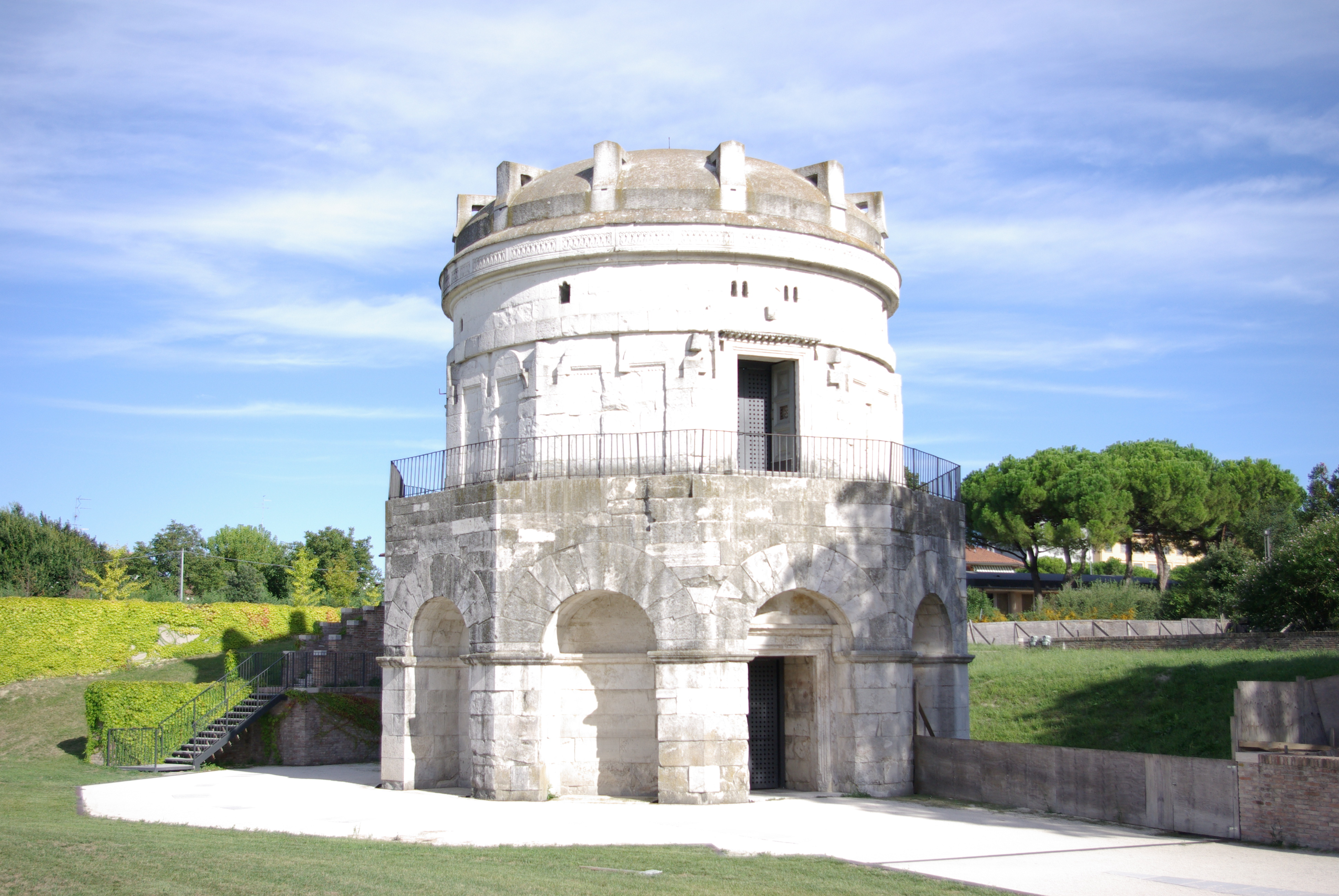 Mausoleo di Teodorico This is a photo of a monument which is part of cultural heritage of Italy.